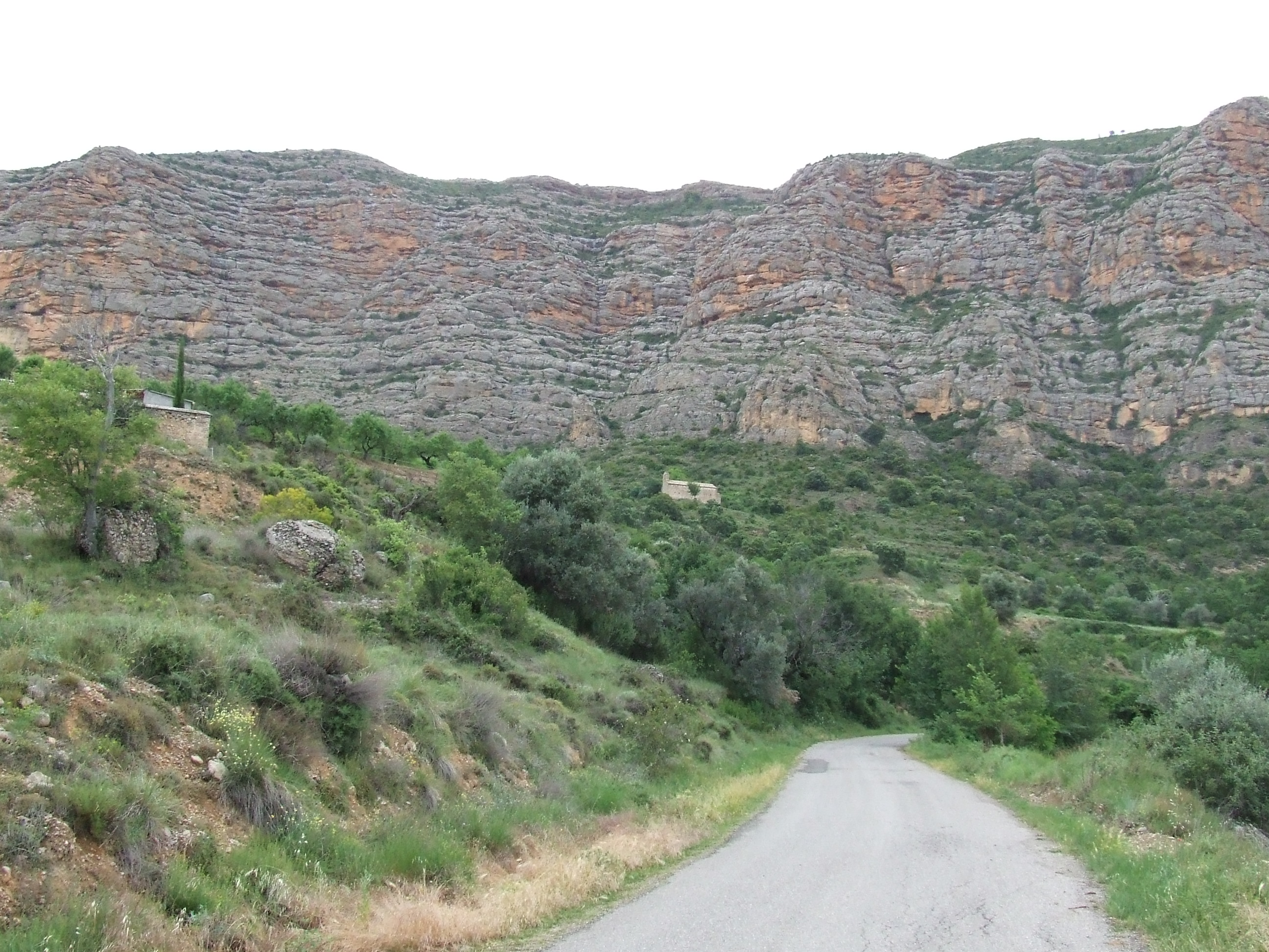 La Serra de Pessonada i la Mare de Déu de la Plana (Pessonada, Hortoneda de la Conca, Conca de Dalt, Pallars Jussà)